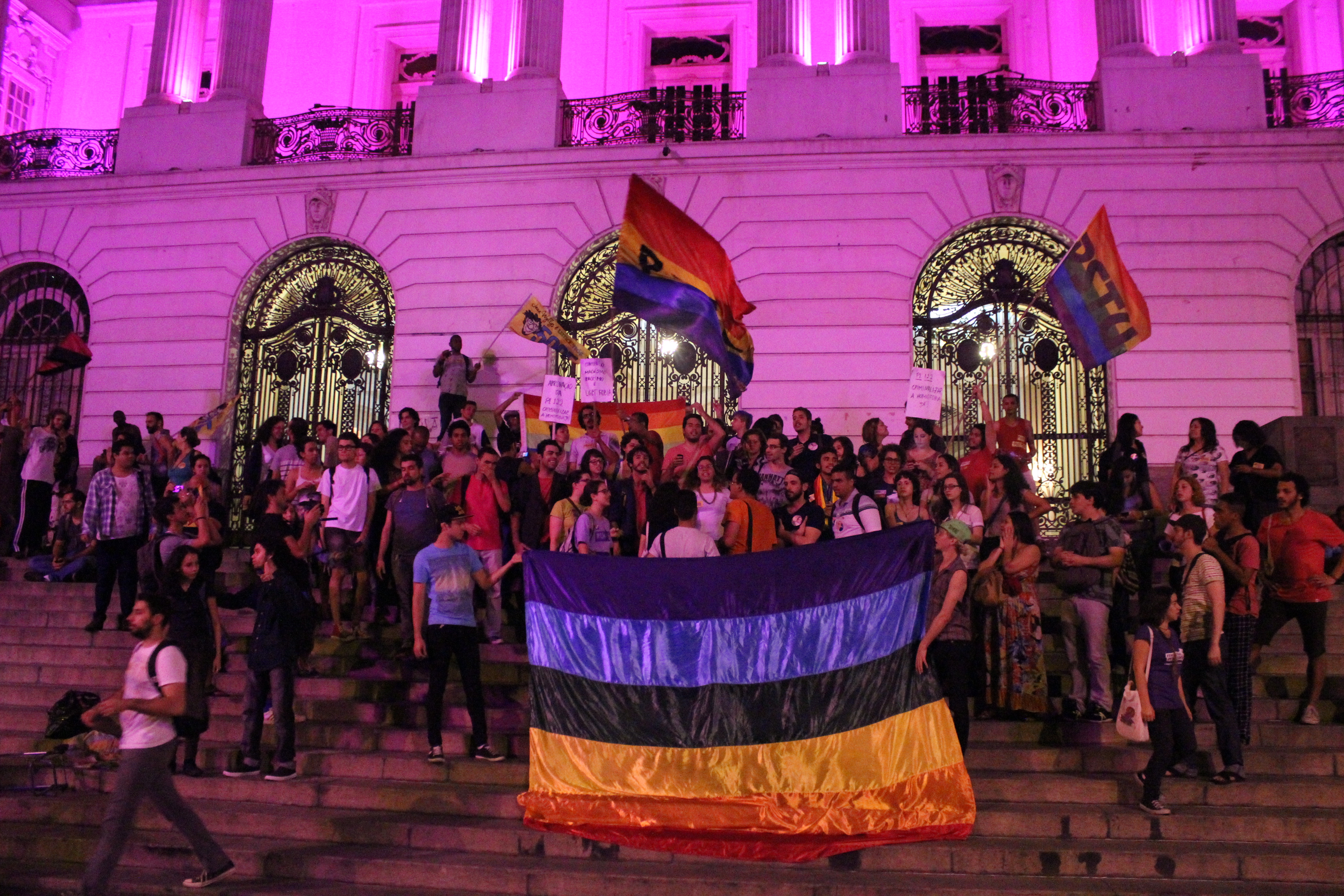 Manifestação anti-homofobia de repúdio a Levy Fidelix